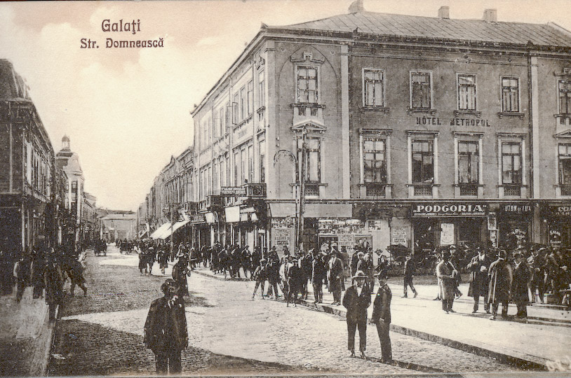 Strada Domneasca din Galati